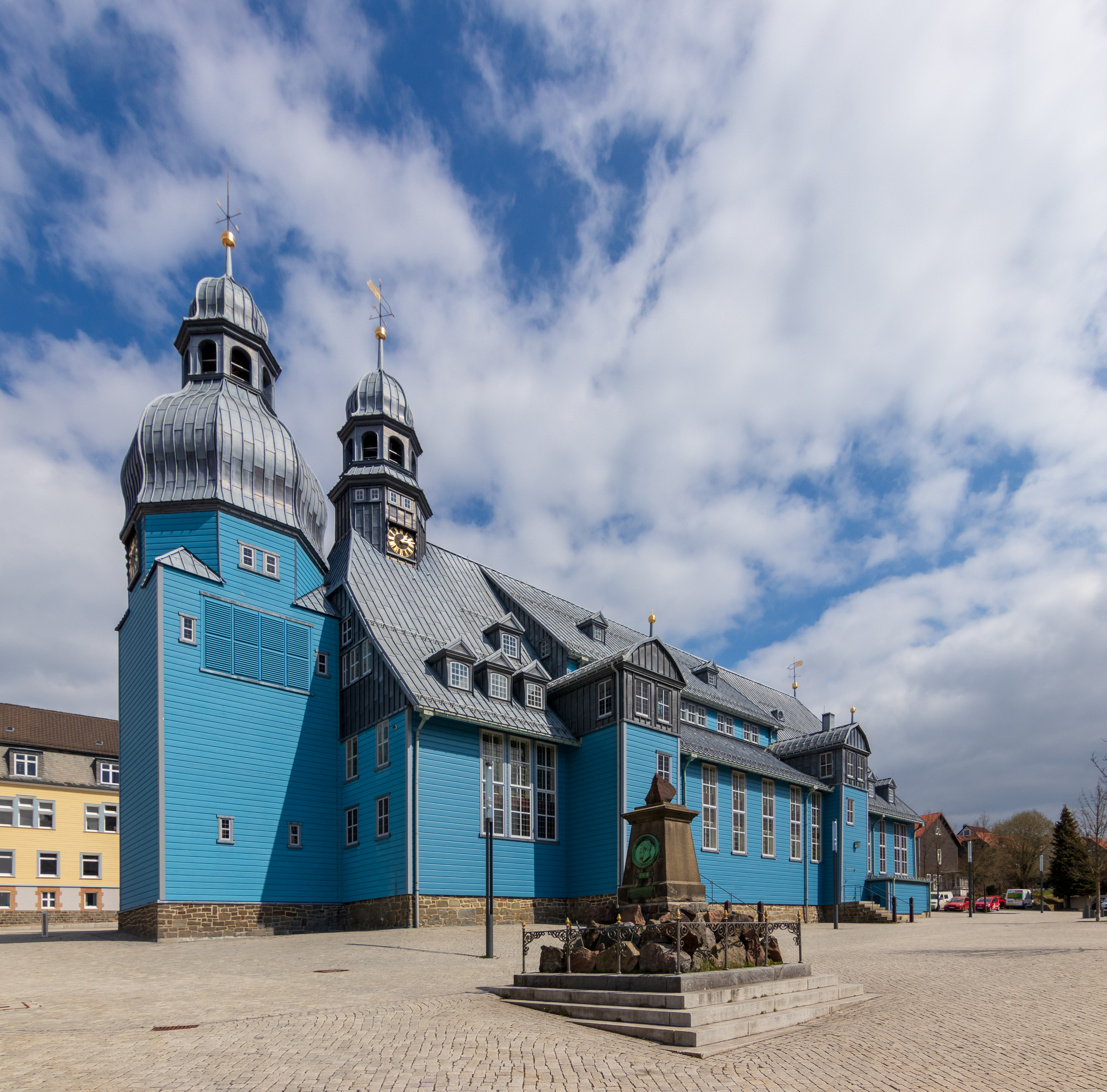 Die evangelisch-lutherische Marktkirche zum Heiligen Geist ist die historische Hauptkirche im Ortsteil Clausthal der Bergstadt Clausthal-Zellerfeld. Sie ist die größte Holzkirche Deutschlands und gehört durch ihre Architektur und Ausstattung zu den bedeutendsten Baudenkmälern des norddeutschen Barocks.